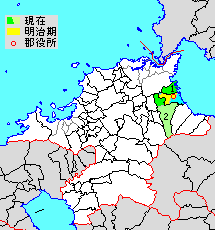 福岡県朝倉郡の位置（1.筑前町 2.東峰村 薄黄：後に他郡に編入された区域）